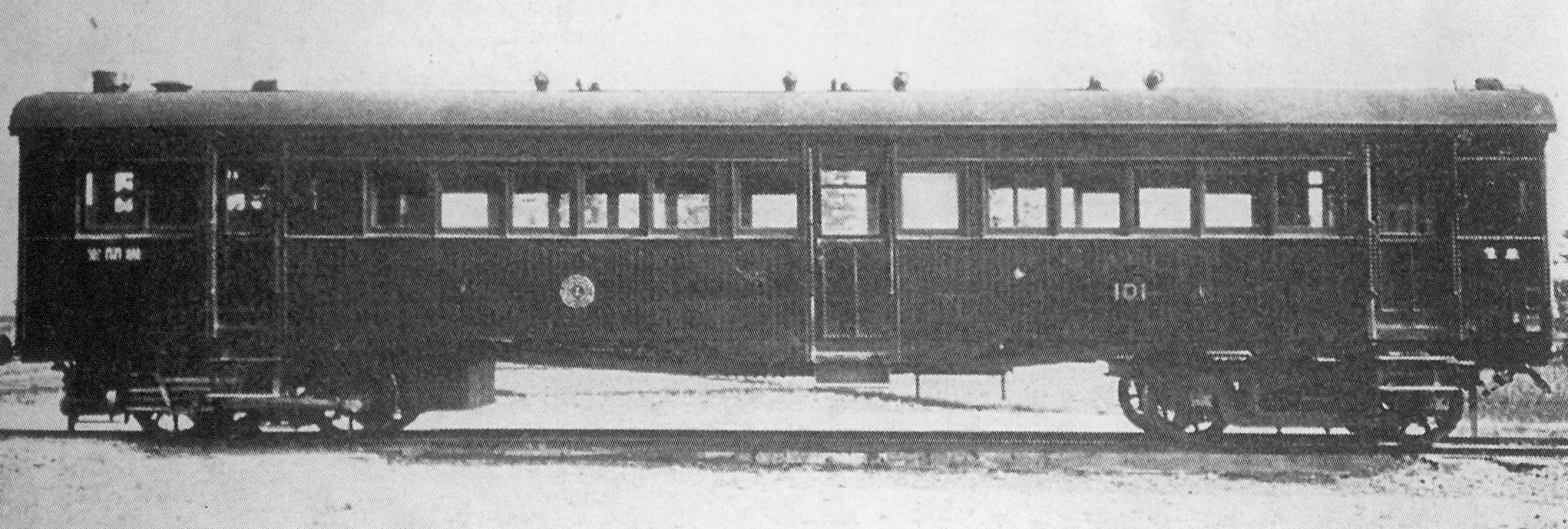 三河鉄道の蒸気動車（大正3年）。大正2年に大阪汽船に発注した旅客用車両。